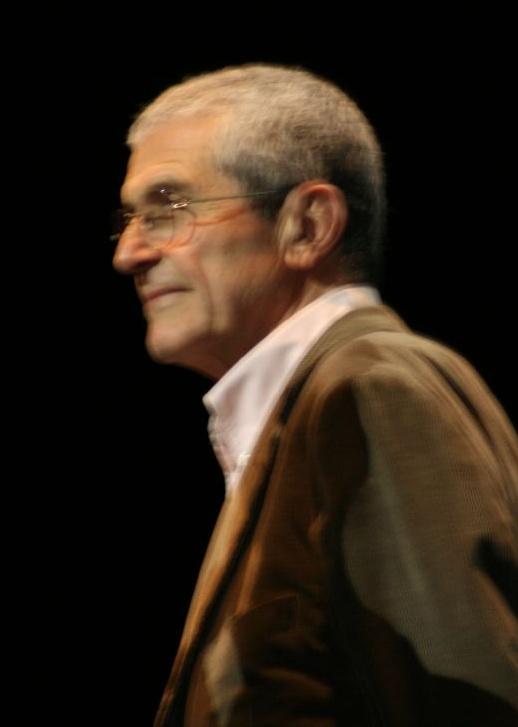 Claude Lelouch - Jules Verne Adventures Film Festival - 2007